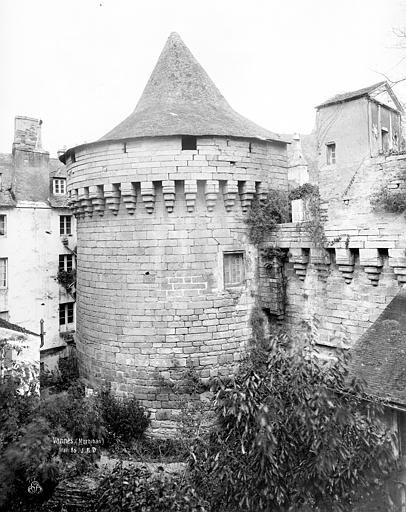 La tour trompette à Vannes (Morbihan, France)